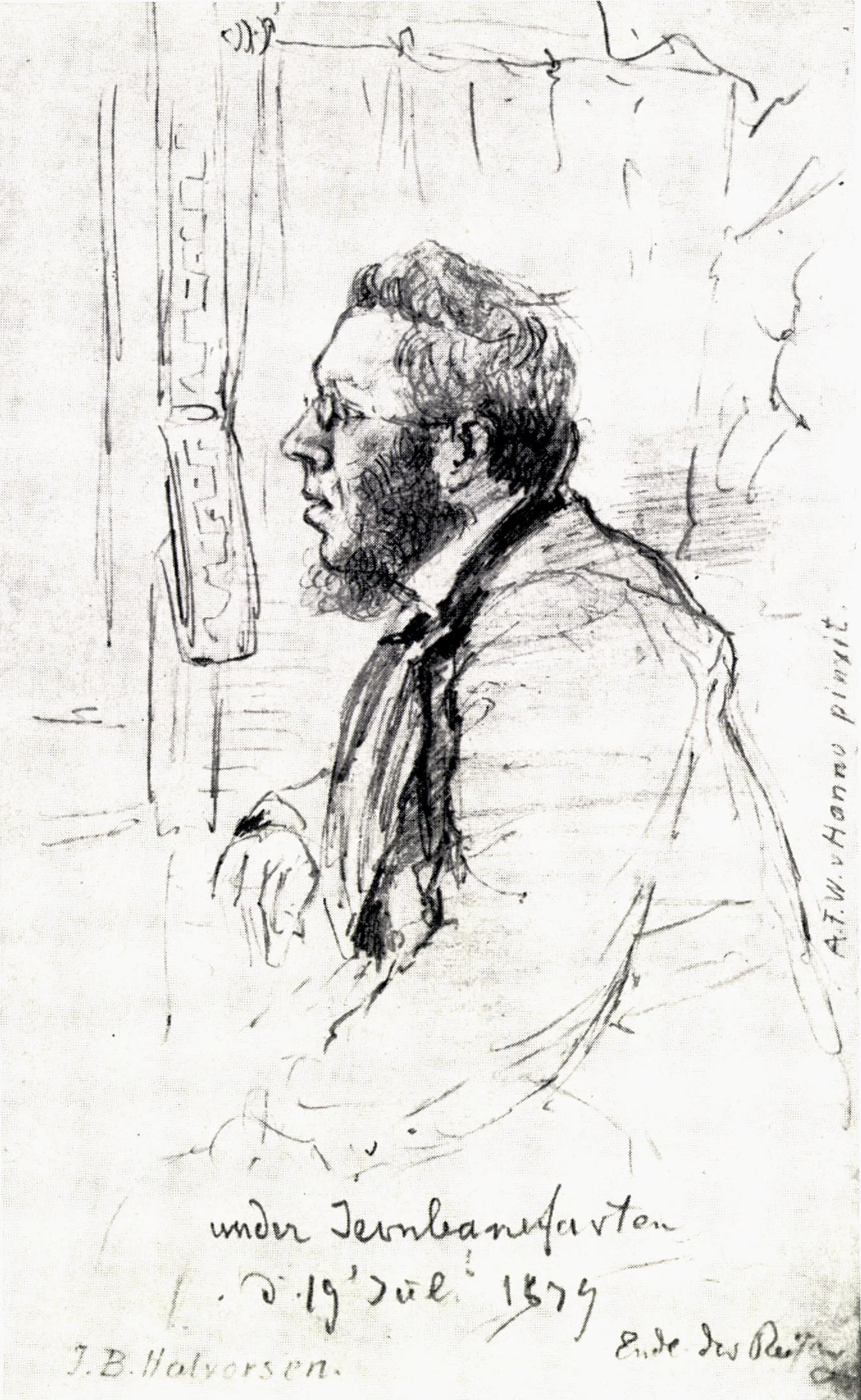 «Jens Braage Halvorsen. Under Jernbanefarten d. 19de Jul. 1879». Pennetegning av Wilhelm von Hanno